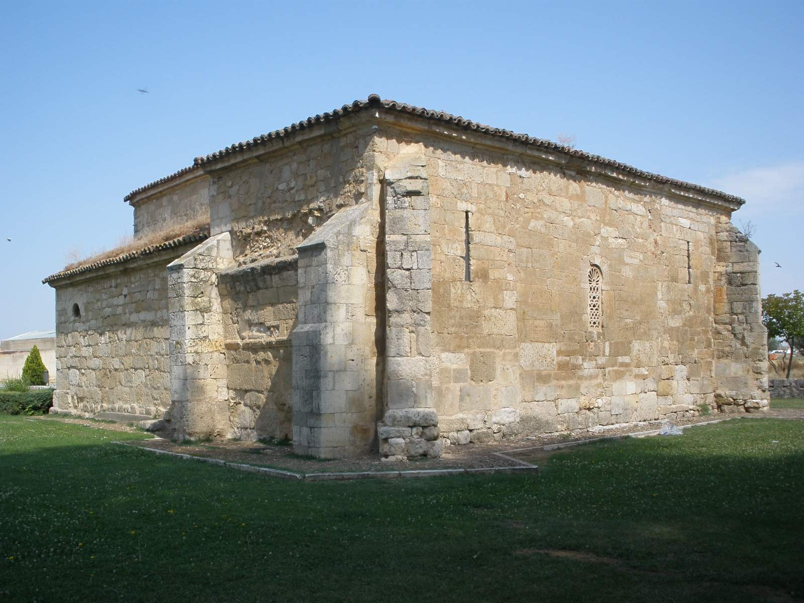 Basílica de San Juan Bautista (San Juan de Baños), en Baños de Cerrato (Palencia)